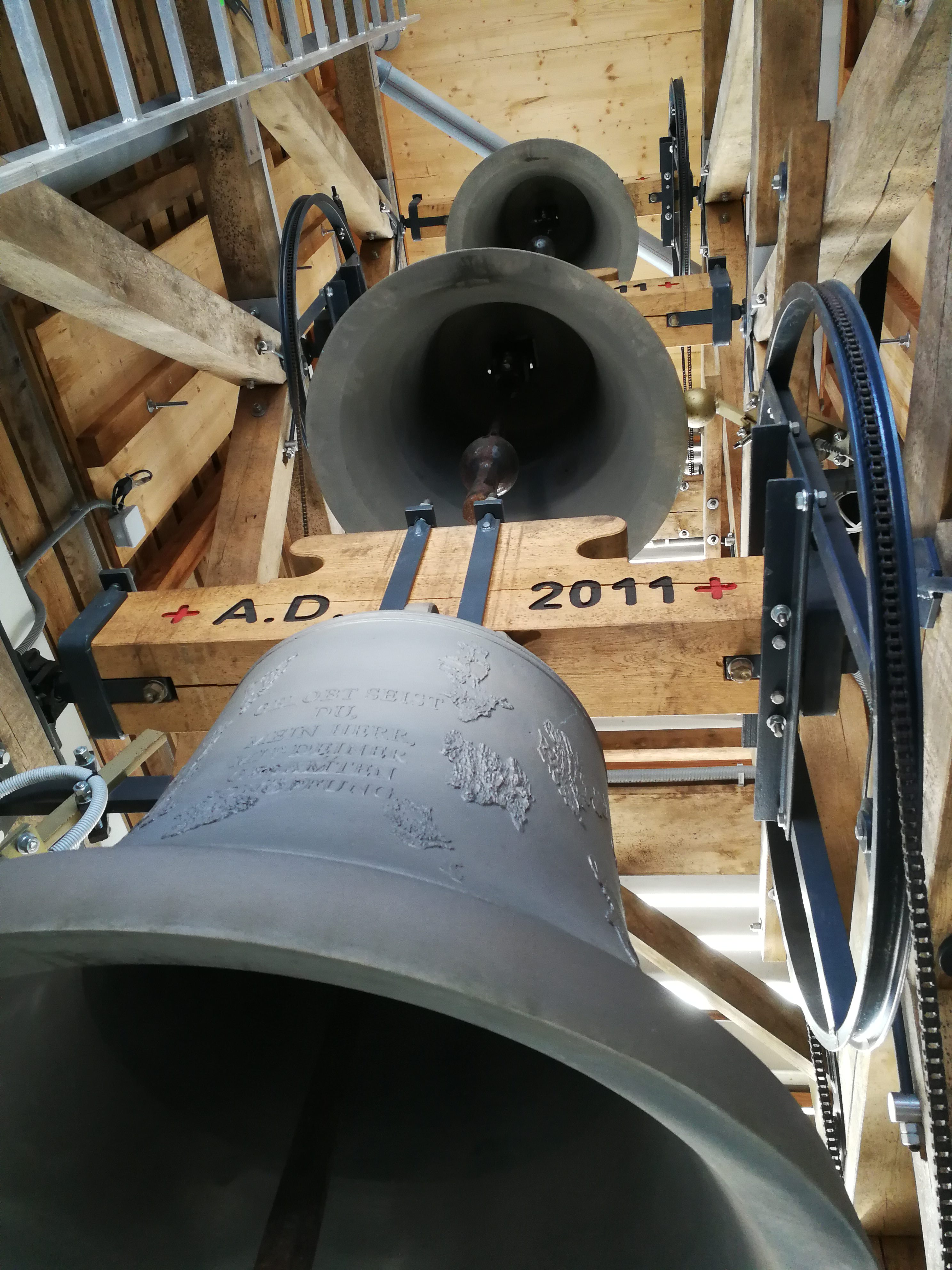 Glocken im Seelsorgezentrum Lichtenberg, gestaltet von Judith P. Fischer, 2011. Inschrift: Friedensglocke …suche Frieden und jage ihm nach! Gerechtigkeitsglocke Das Brot, das wir teilen, wird als Rosen erblühen. Schöpfungsglocke Gelobt seist du, mein Herr, mit deiner gesamten Schöpfung.